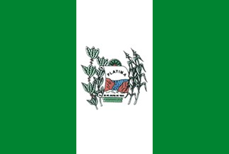 Bandeira de Platina - SP - Brasil.